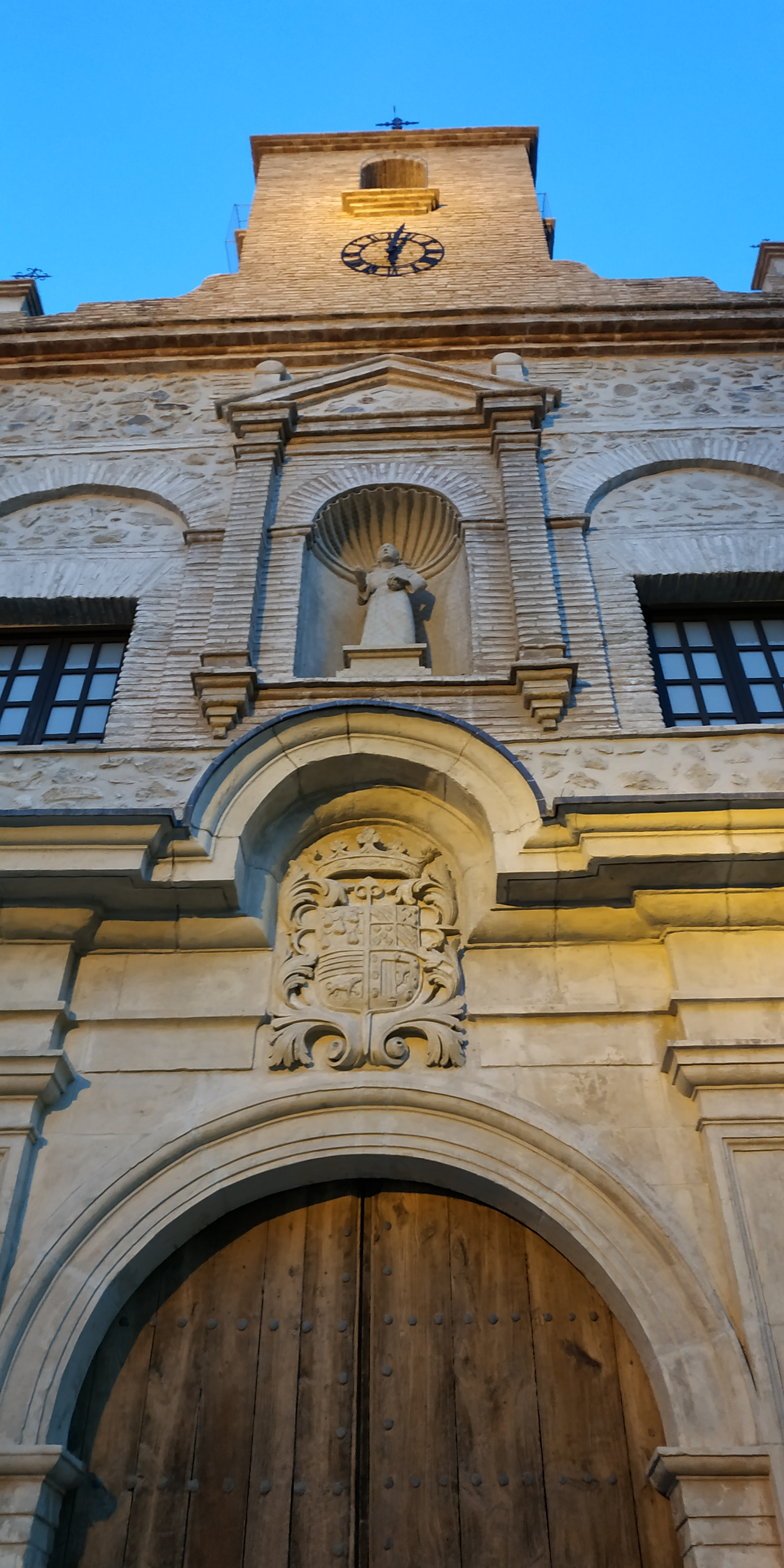 Portada San Diego Lorca